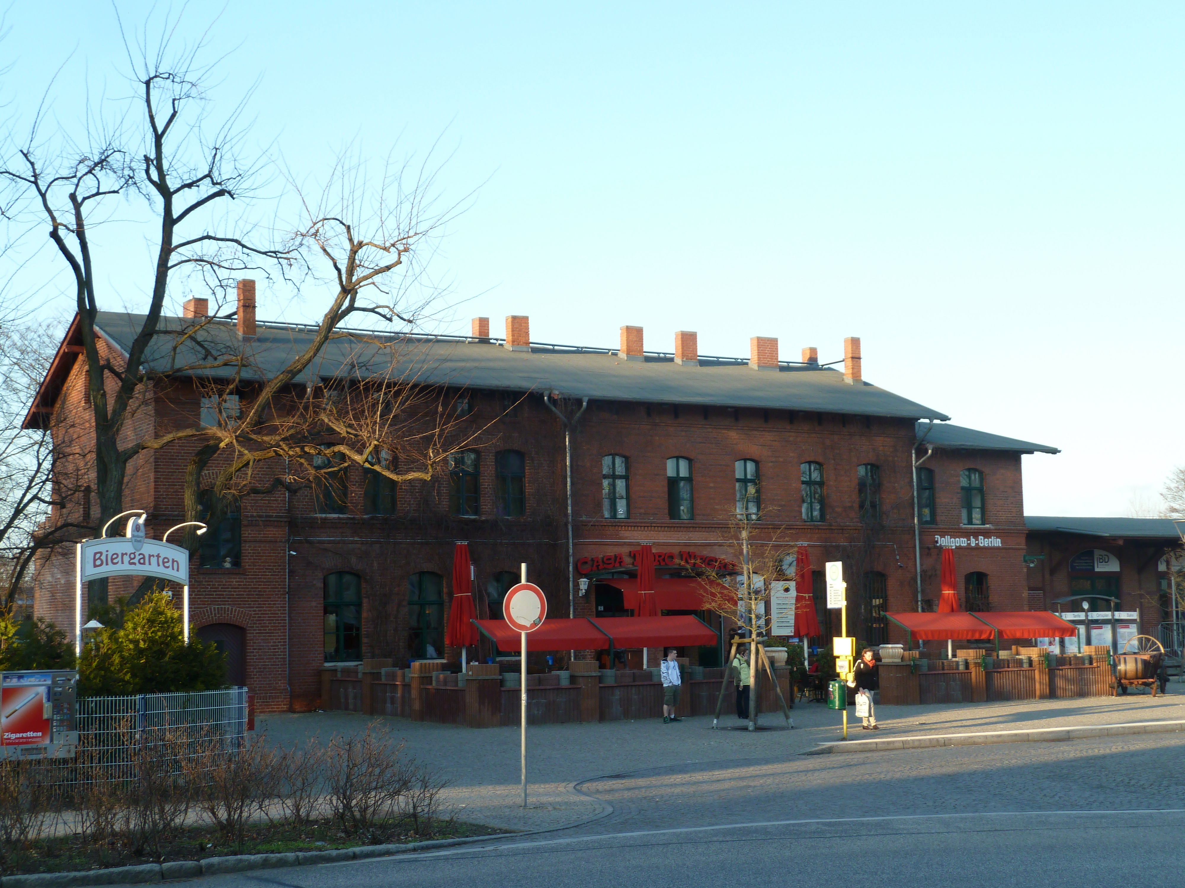 Bahnhof Dallgow-Döberitz mit Vorplatz